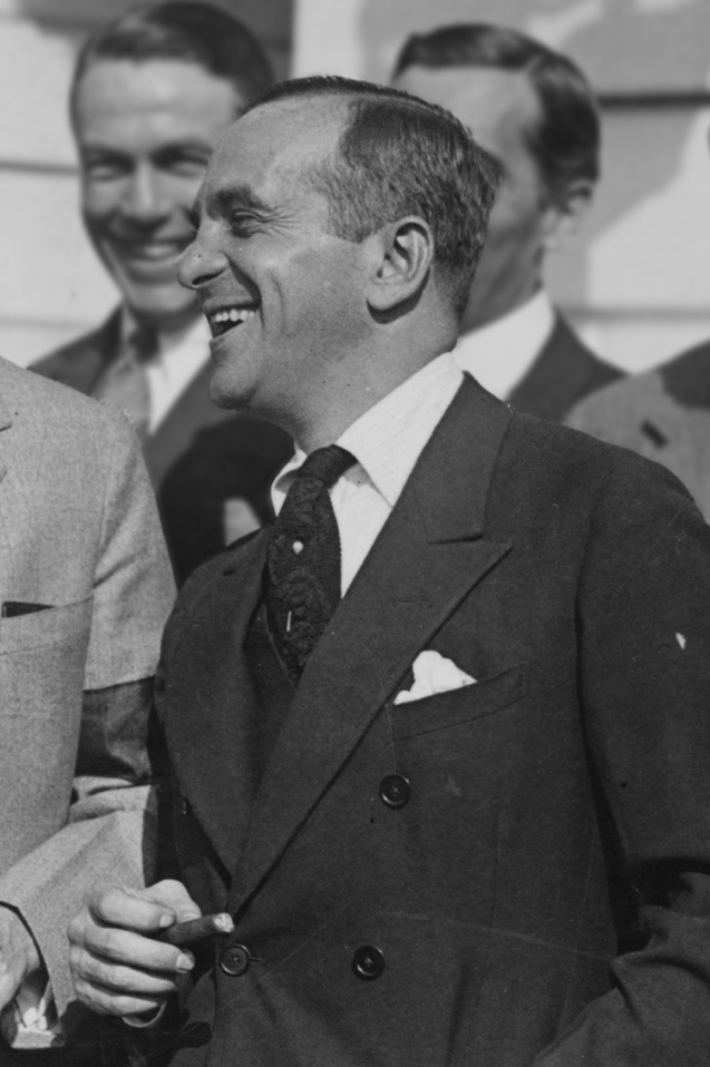 Entertainer Al Jolson